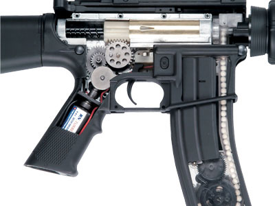 El motor o comunmente llamado "gearbox" de una replica electrica (AEG)